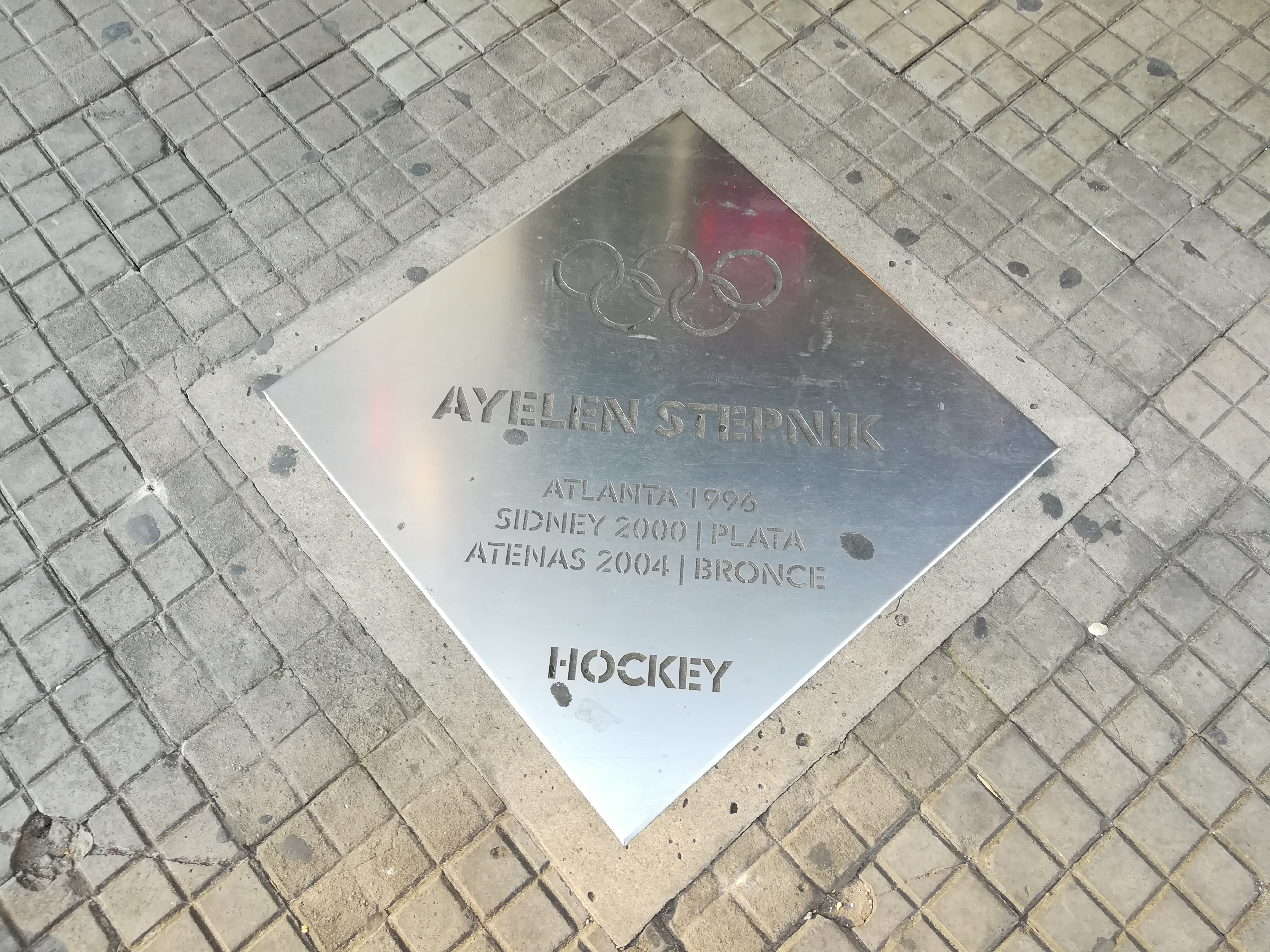 Paseo de los Olímpicos de los en la Avenida Pellegrini (Rosario).